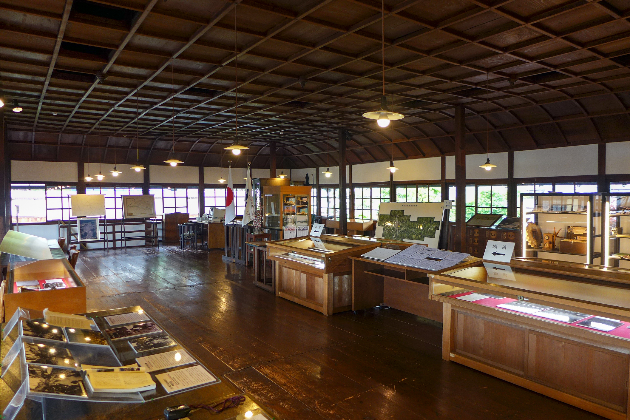 Takayama City Memorial Hall Interior